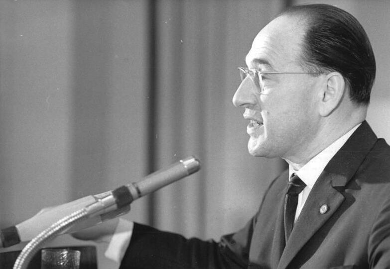 Zantralbild Franke 4.11.1966 Berlin: Kulturminister Klaus Gysi sprach auf der Jahreskonferenz des Schriftstellerverbandes Kulturminister Klaus Gysi ergriff am 4.11.1966 als letzter Diskusssionsredner auf der 1. Jahreskonferenz des Deutschen Schriftstellerverbandes, die vom 2. bis 4.11.1966 in der Kongreßhalle am Berliner Alexanderplatz stattfand, das Wort.